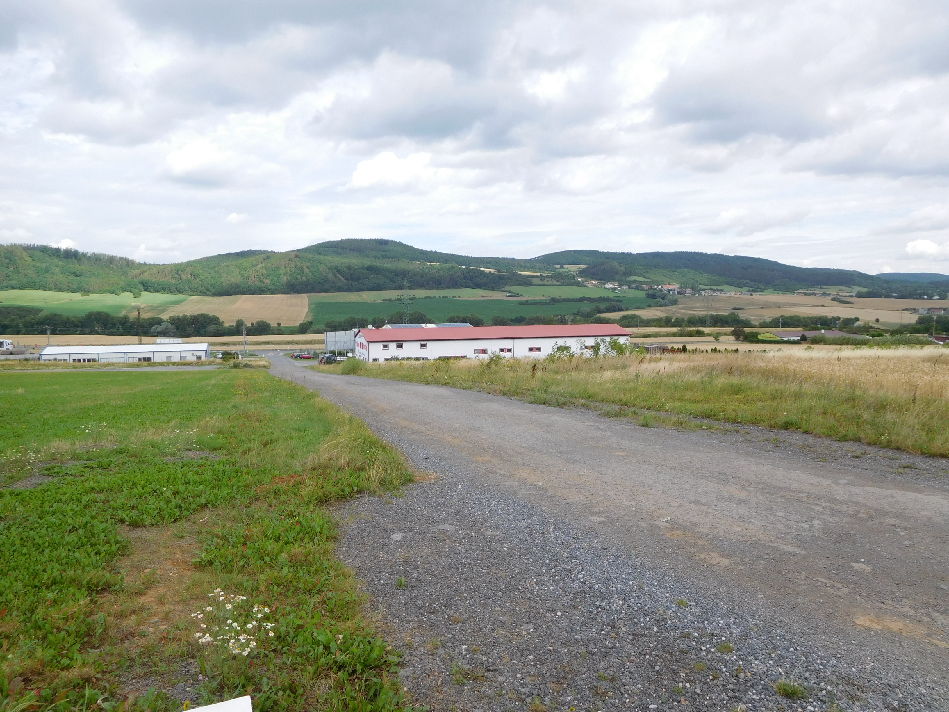 Bavoryně - Průmyslová zóna - celkový pohled od JV; v pozadí uprostřed vrch Plešivec (495 m) v Křivoklátské vrchovině